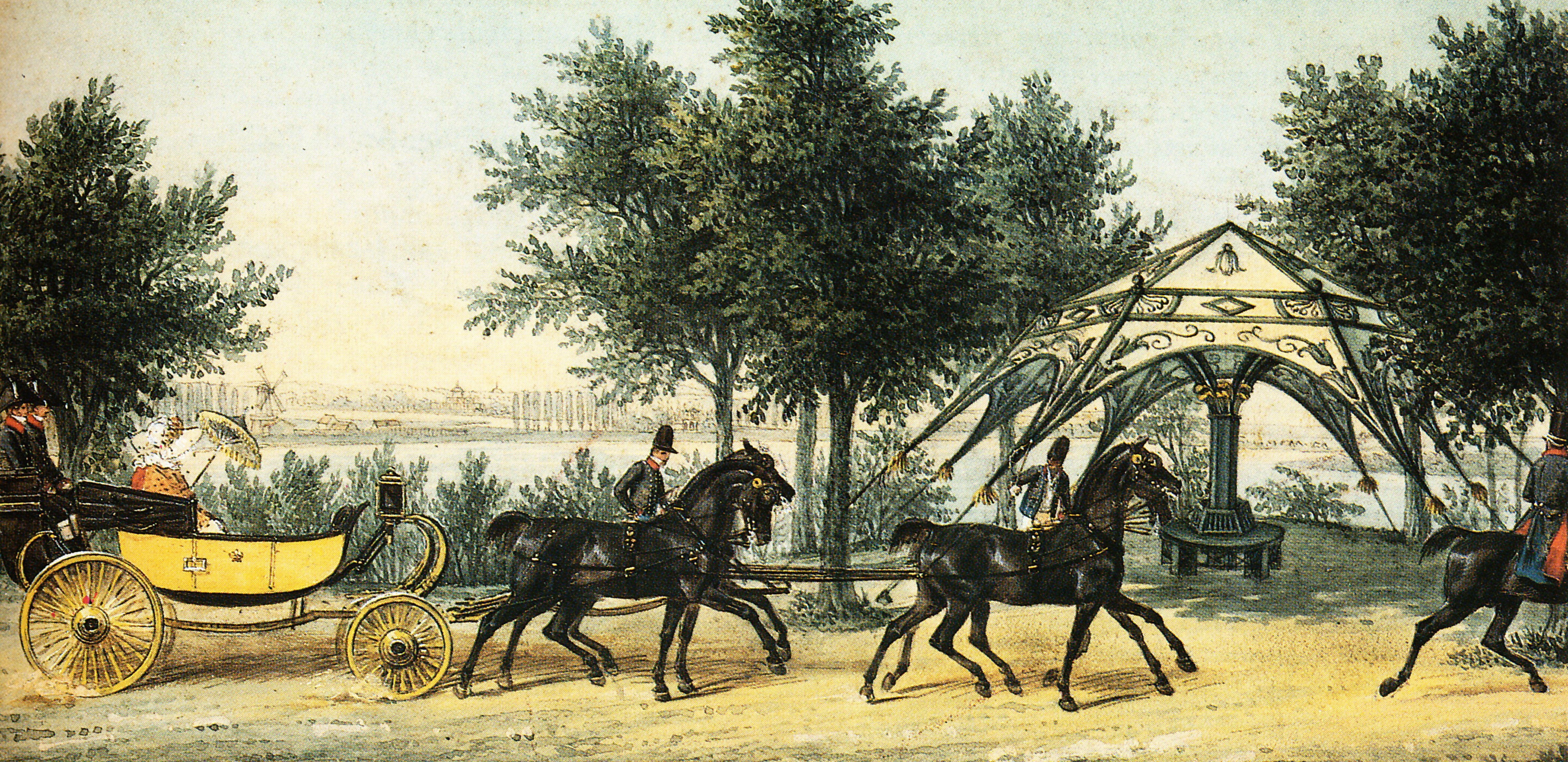 das Zelt im Park Klein-Glienicke, um 1840, Franz Krüger